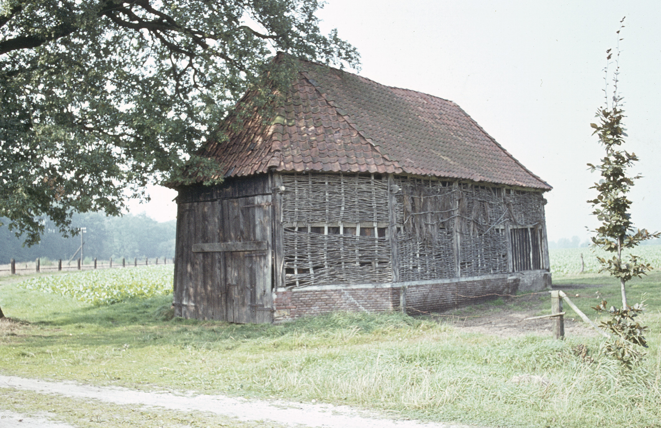 SCHAAPSKOOI: Exterieur OVERZICHT